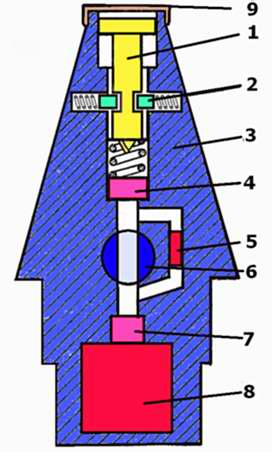 simple artillery fuze Jednoduchý delostrelecký zapalovač 1 - úderník s ihlou 2 - odstredivé poistky 3 - telo zapaľovača 4 - zápalka/roznetka 5 - oneskorovač 6 - ventil - prepínač oneskorenia 7 - rozbuška 8 - počinová nálož 9 - viečko